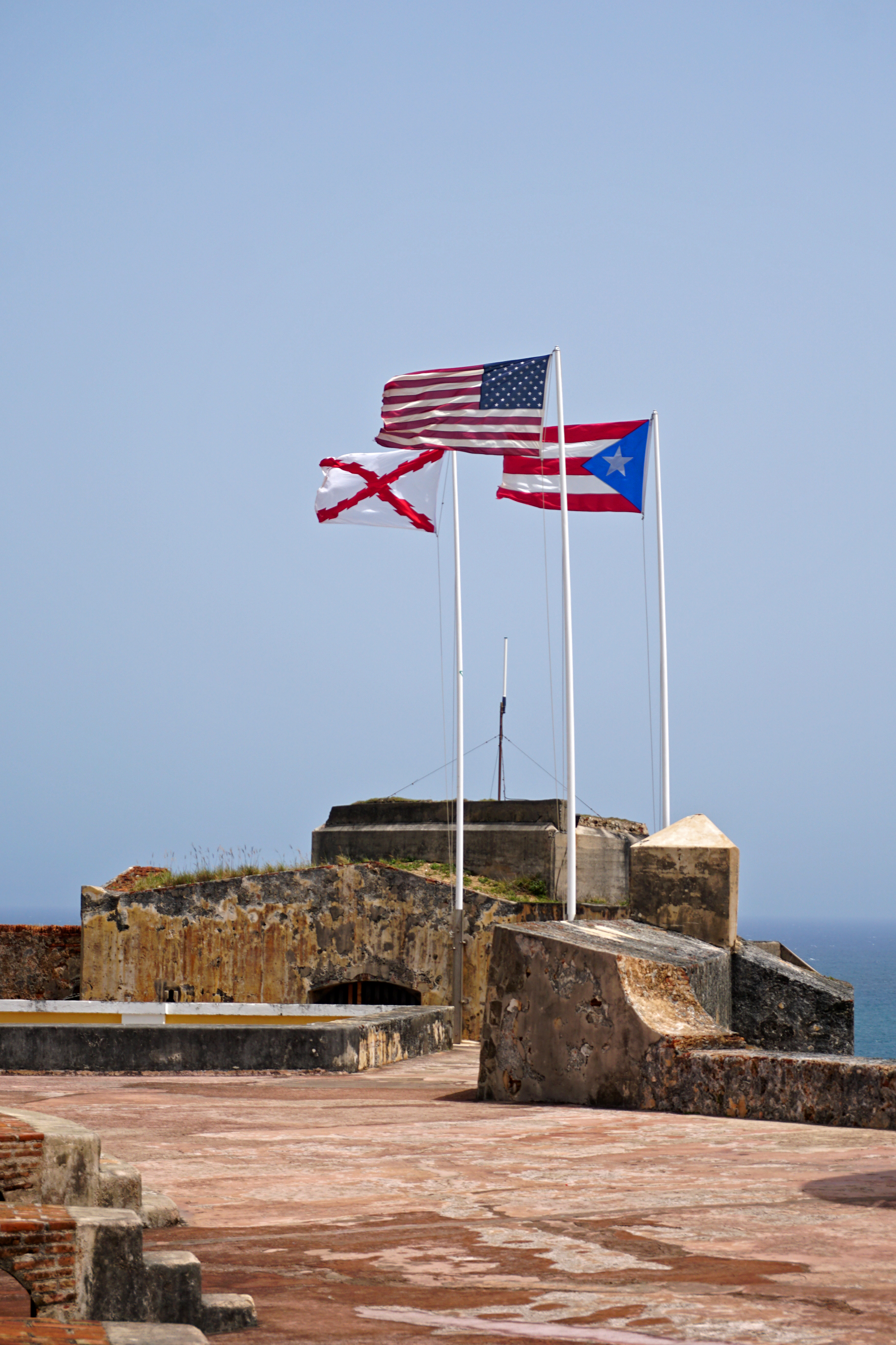 Banderas del Reino Español (Cruz de Borgoña), Estados Unidos y Puerto Rico ondendo en la parte alta del Castillo San Felipe del Morro, Viejo San Juan, Puerto Rico